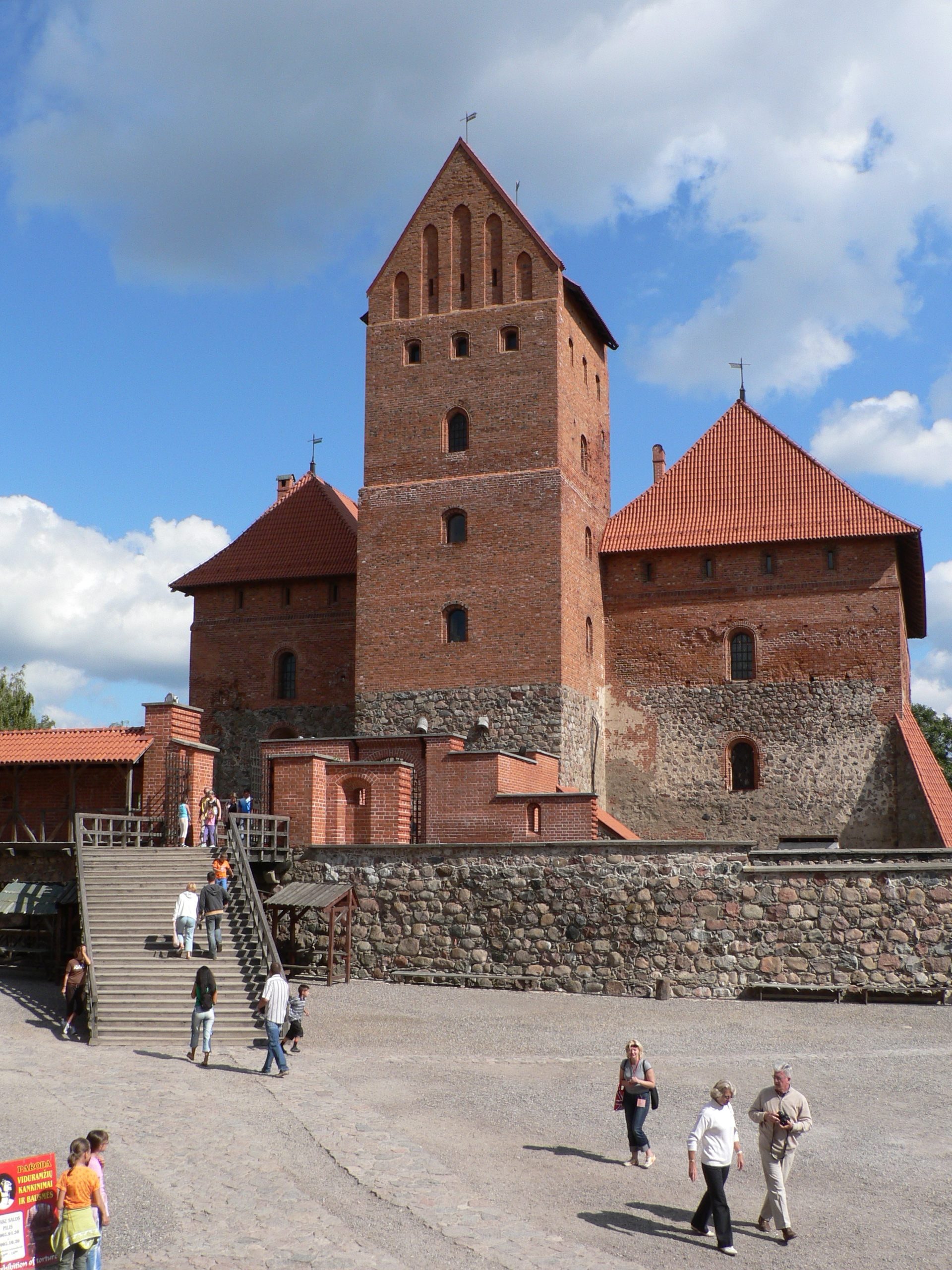 Trakai Island Castle yard with donjon